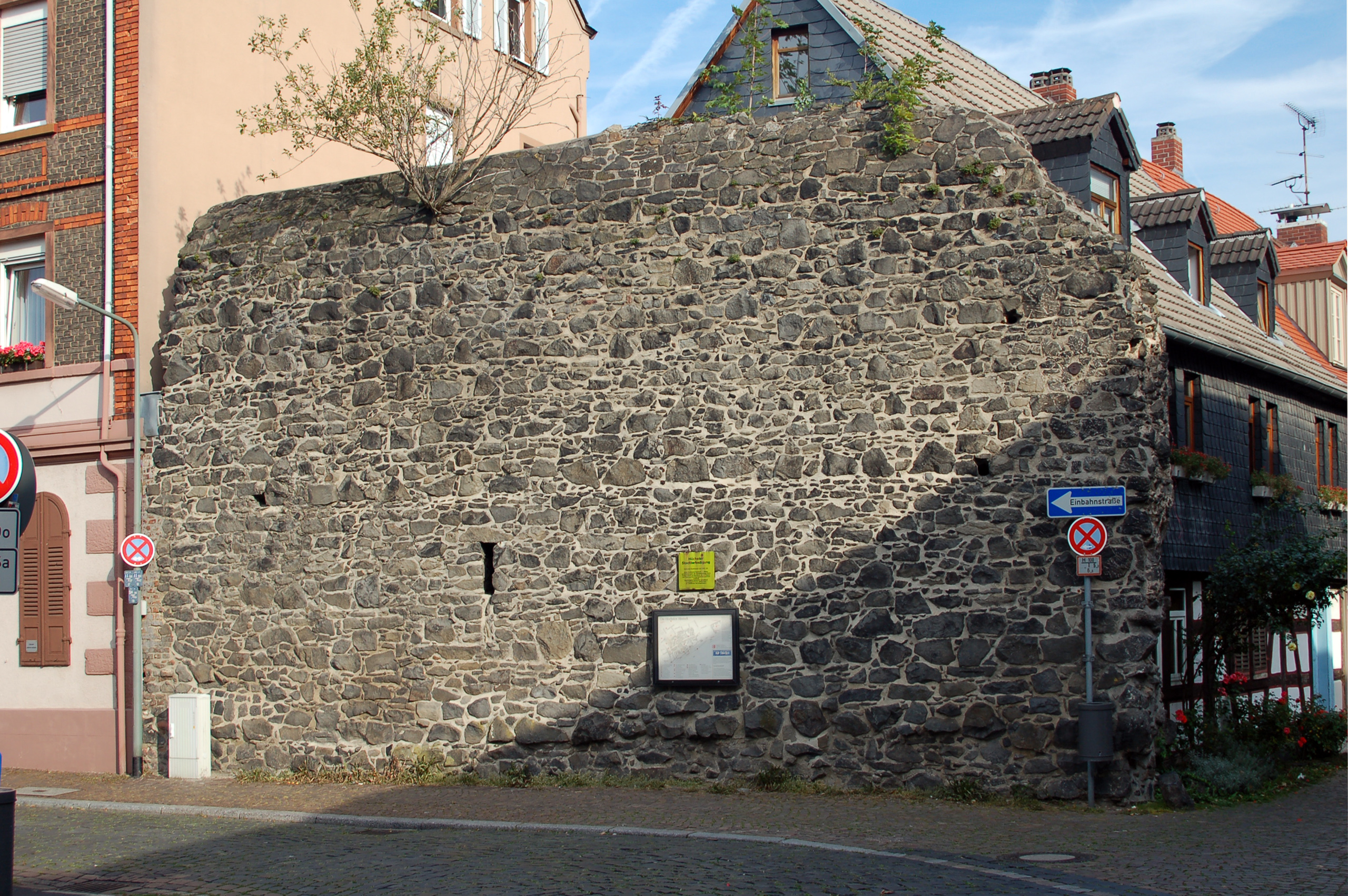 Rest der alten Höchster Stadtmauer am Marktplatz, Ecke Antoniterstraße 8